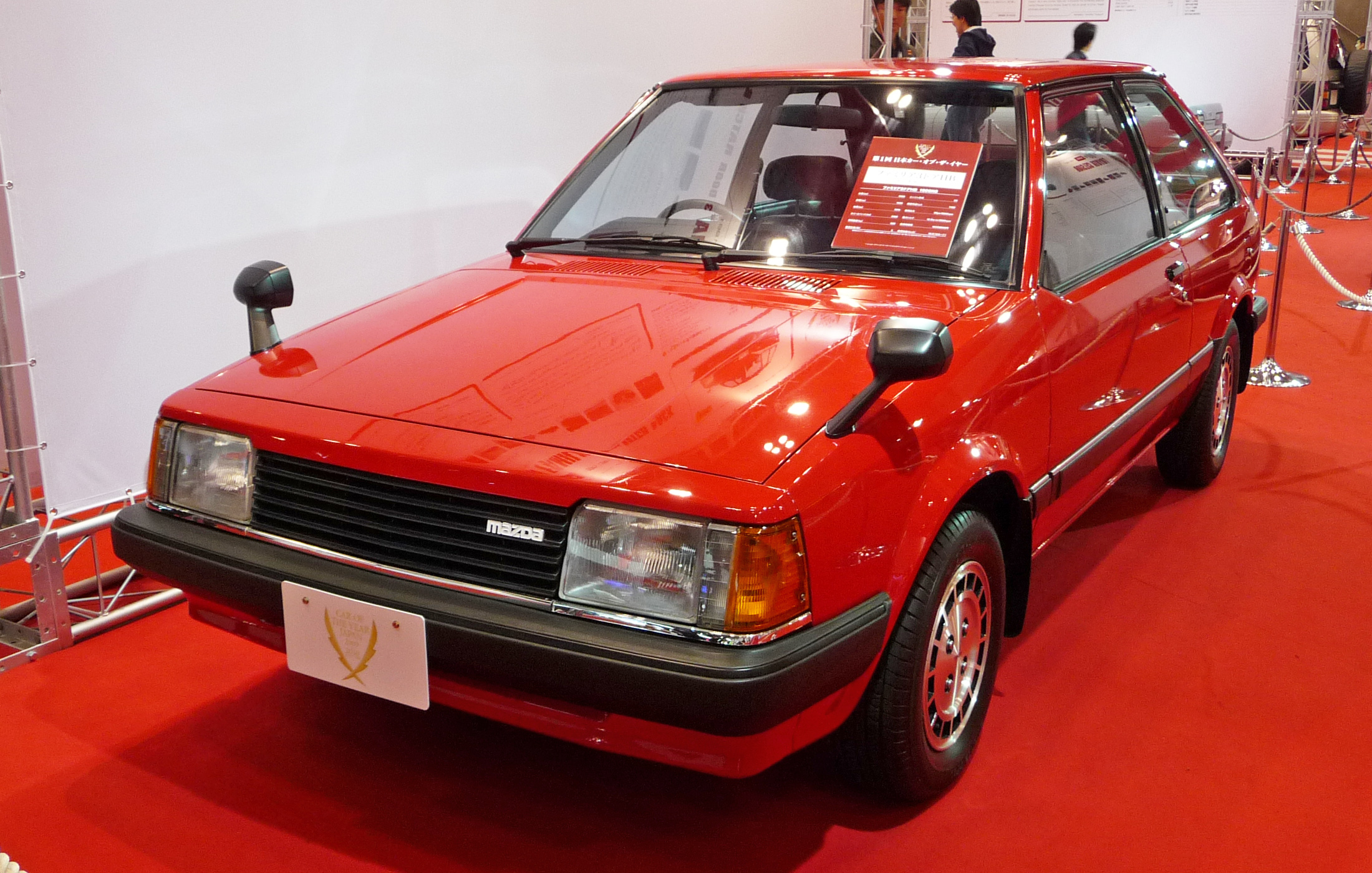 マツダ・ファミリア、第1回日本カーオブザイヤー受賞車（東京モーターショー2009、日本カーオブザイヤー歴代受賞車展示コーナー）